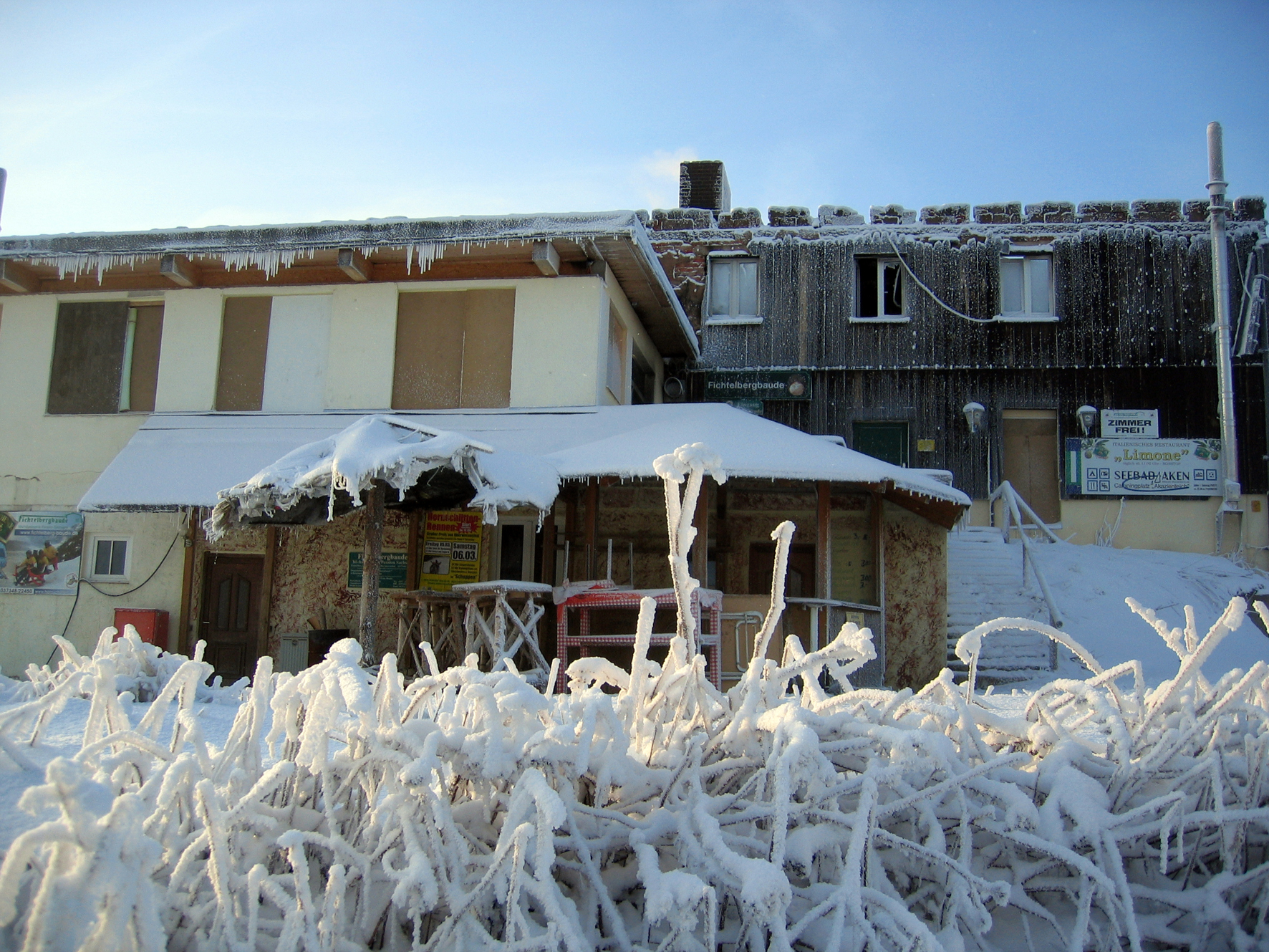 Oberwiesenthal - Die abgebrannte Fichtelbergbaude